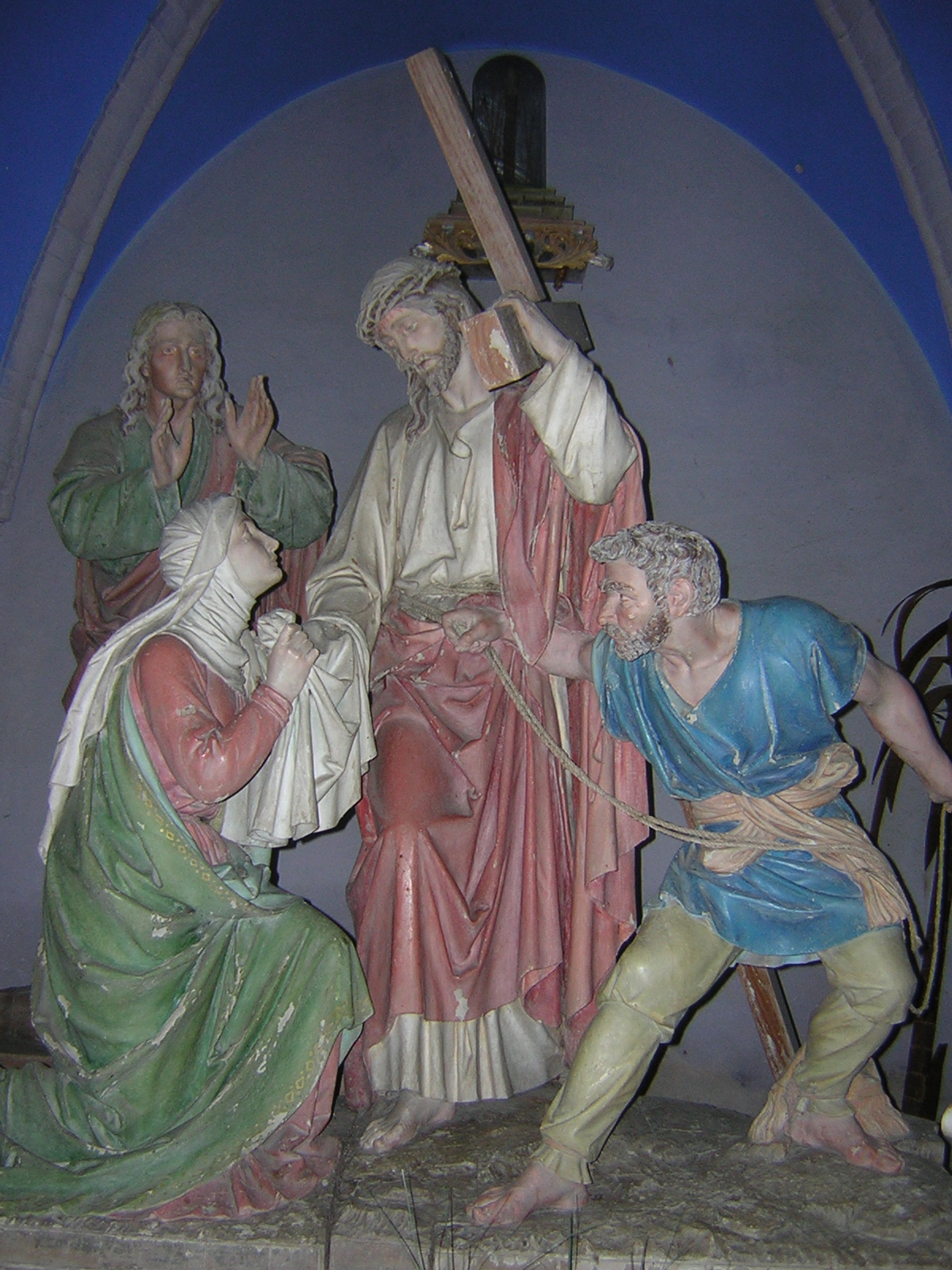 Kalwaria w Glotowie. Stacja VI